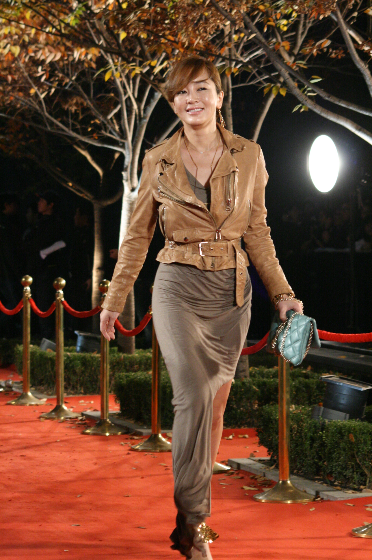 2011 인디 브랜드 페어 & 2011 스타일 아이콘 어워즈